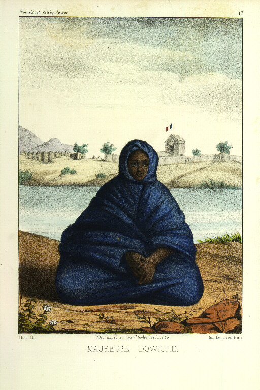 Mauresse Dowiche . Planche n° XVI de Esquisses sénégalaises de l'abbé Boilat, 1853. « C’est le portrait d’une Maurese de la tribu des Dowiches. Elle est assise sur le sable où elle termine son salam. La bâtisse que l’on aperçoit dans le lointain est le fort français de Sénoudébou, sur les rives de la Falémée, au pays des Toucoulaures. »